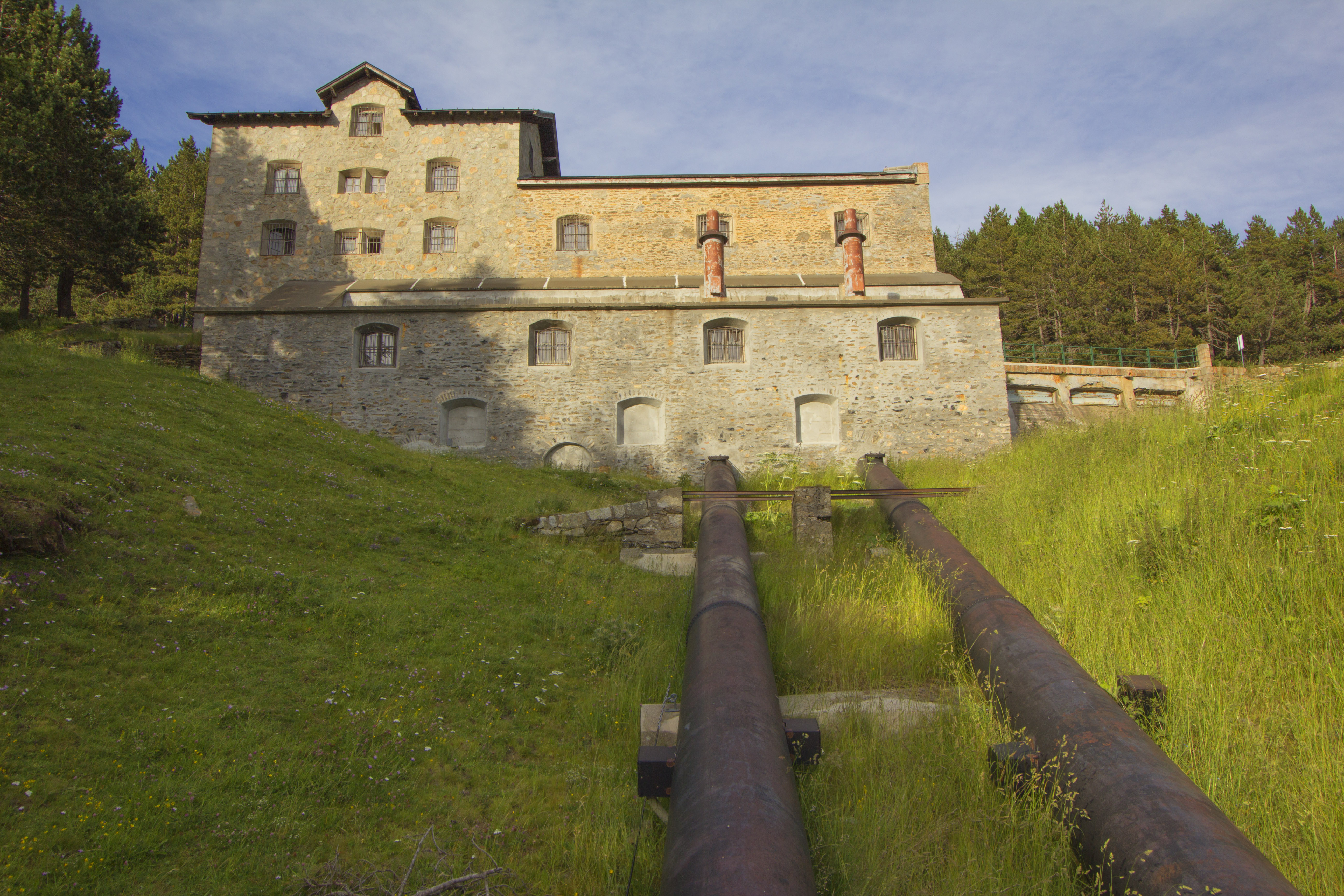 Edifici de la cambra d'aigües de la central hidroelèctrica de Capdella (Pallars Jussà)